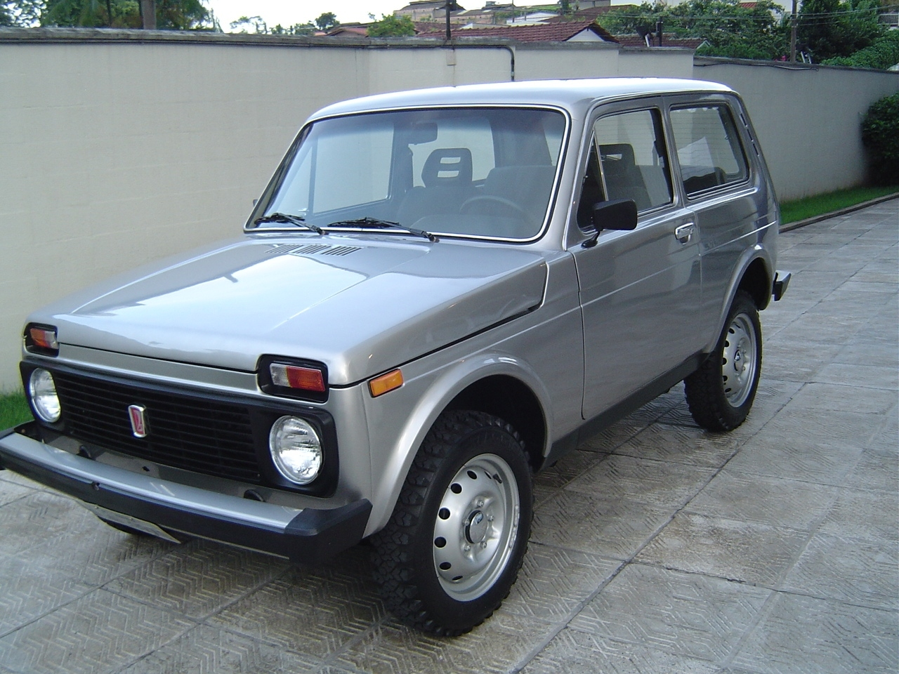 Lada Niva 1991